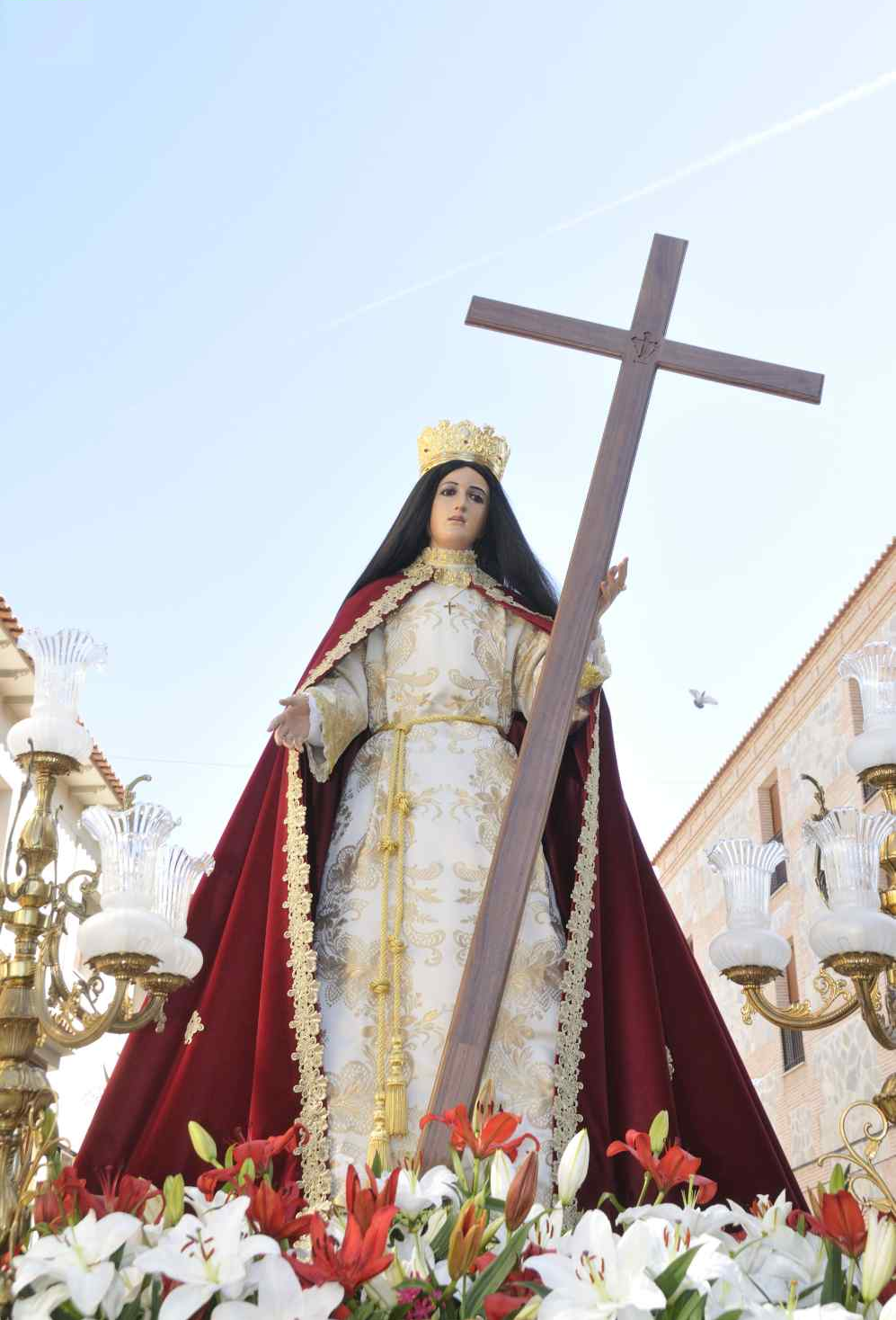 Santa Cruz y Santa Reina Elena de Ocaña (Toledo)